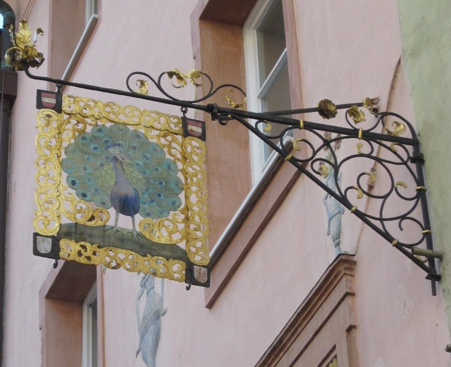 Wirtshausschild des ehemaligen Gasthaus Pfau in der Bindergasse in Bozen